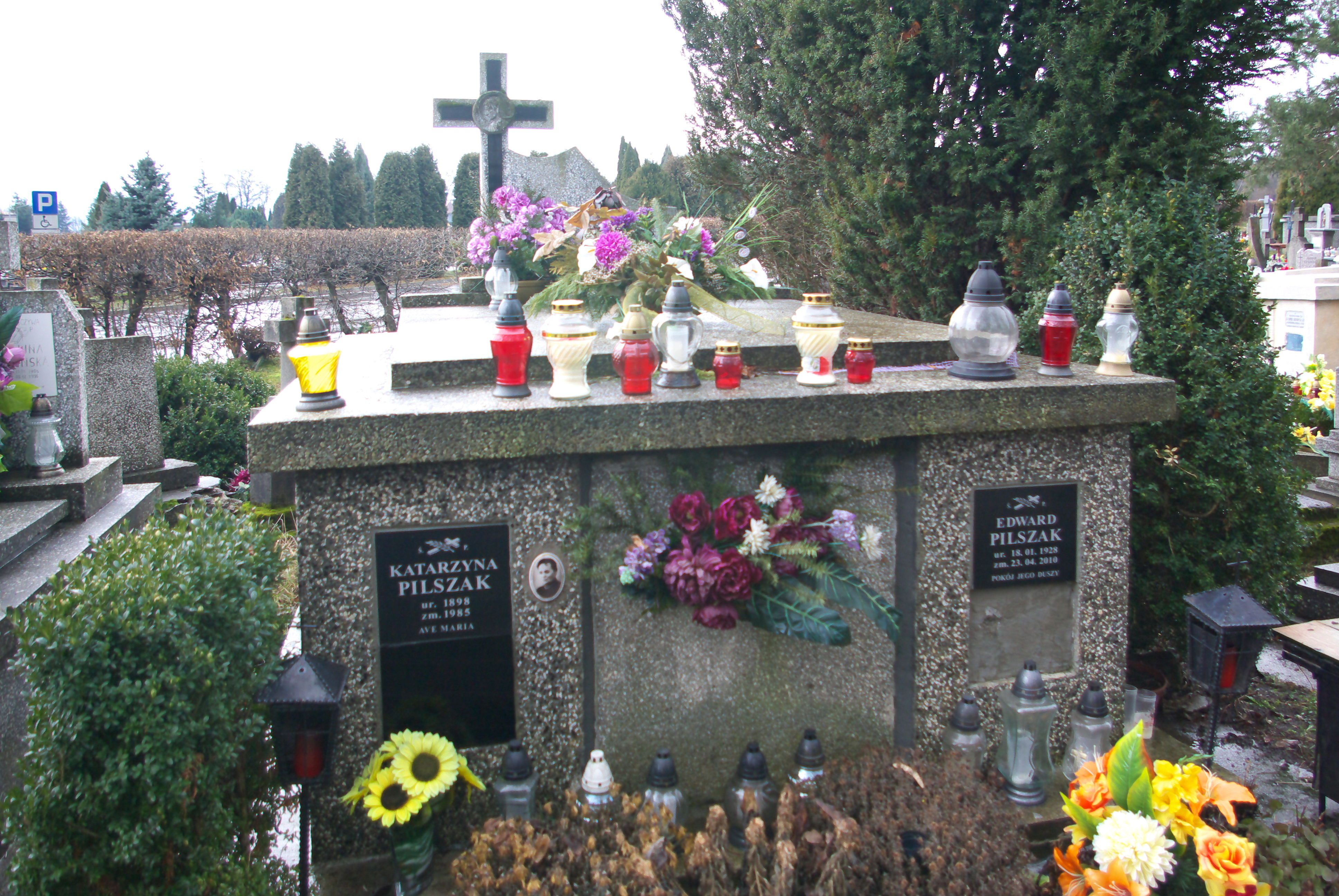 Grobowiec rodziny Pilszak w części „Matejki Stary” Cmentarza Centralnego w Sanoku. Pochowany Edward Pilszak.